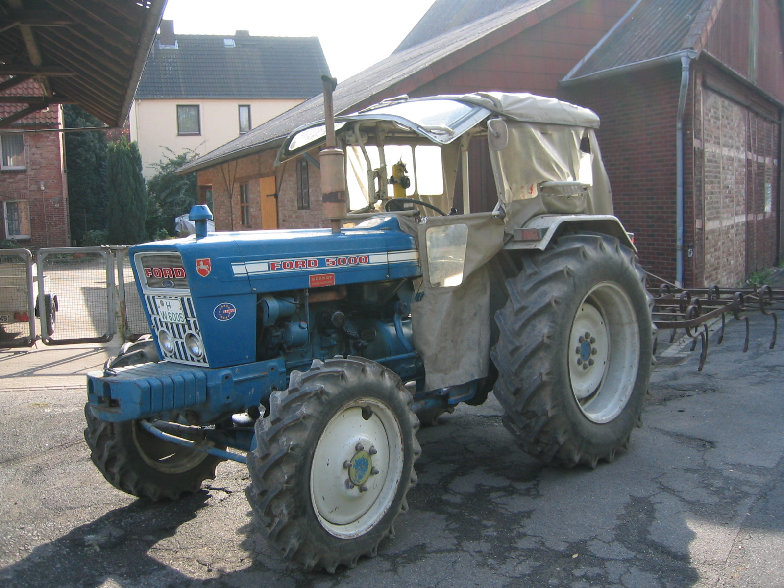 Ford-Schlepper 5000 A (Produktionszeitraum 1968–1972, 75 PS bei 2100/min aus 4-Zylinder-4-Takt-Dieselmotor, 8 Vorwärts- und 2 Rückwärtsgänge, Gewicht 3145 kg)